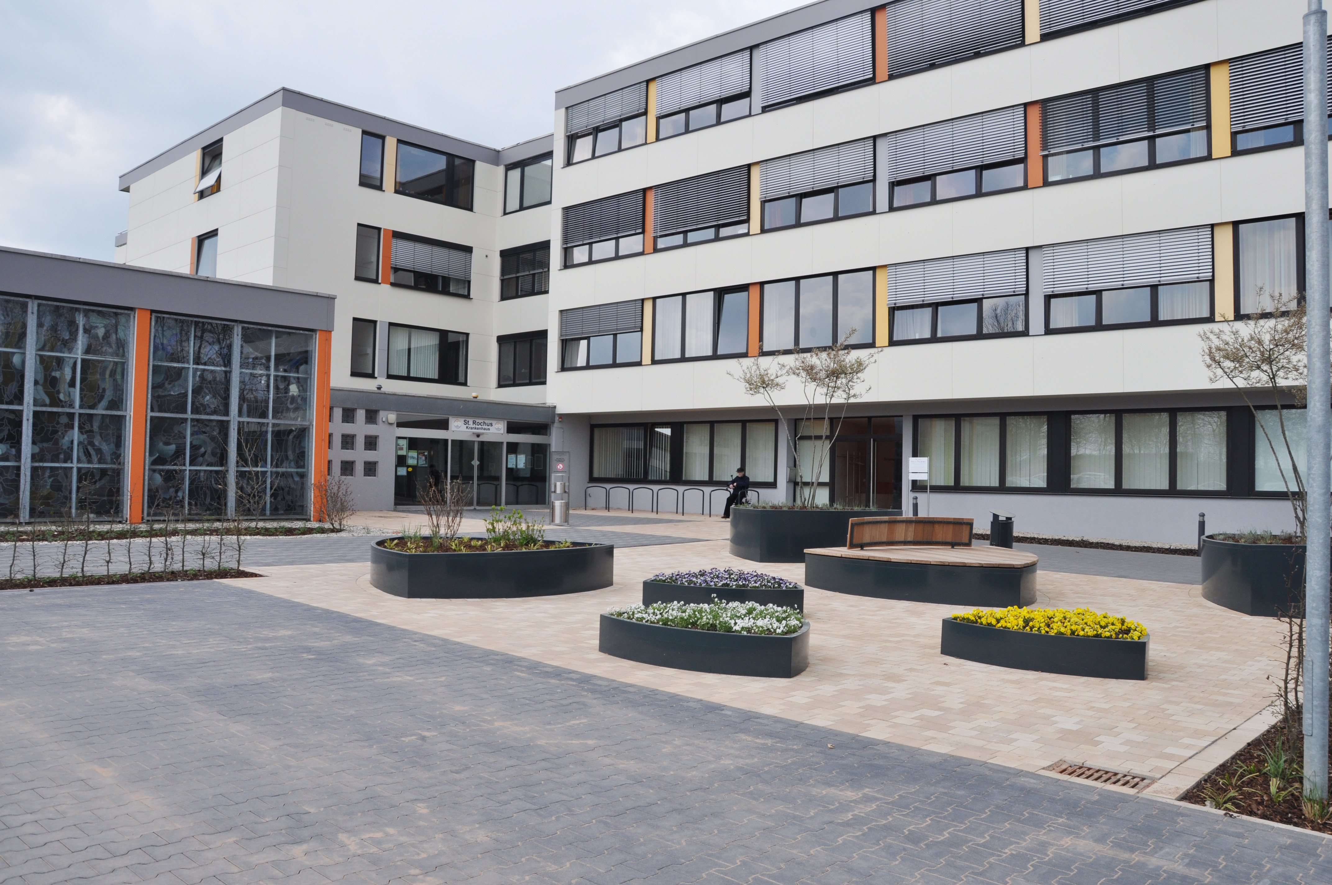 Das St. Rochus Krankenhaus 2017